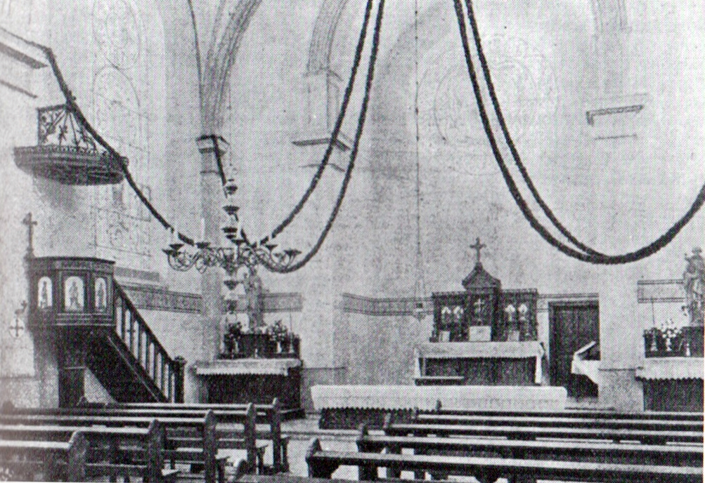 Gerlingen (Wenden) Pfarrkirche Antonius Einsiedler, Innenansicht um 1900